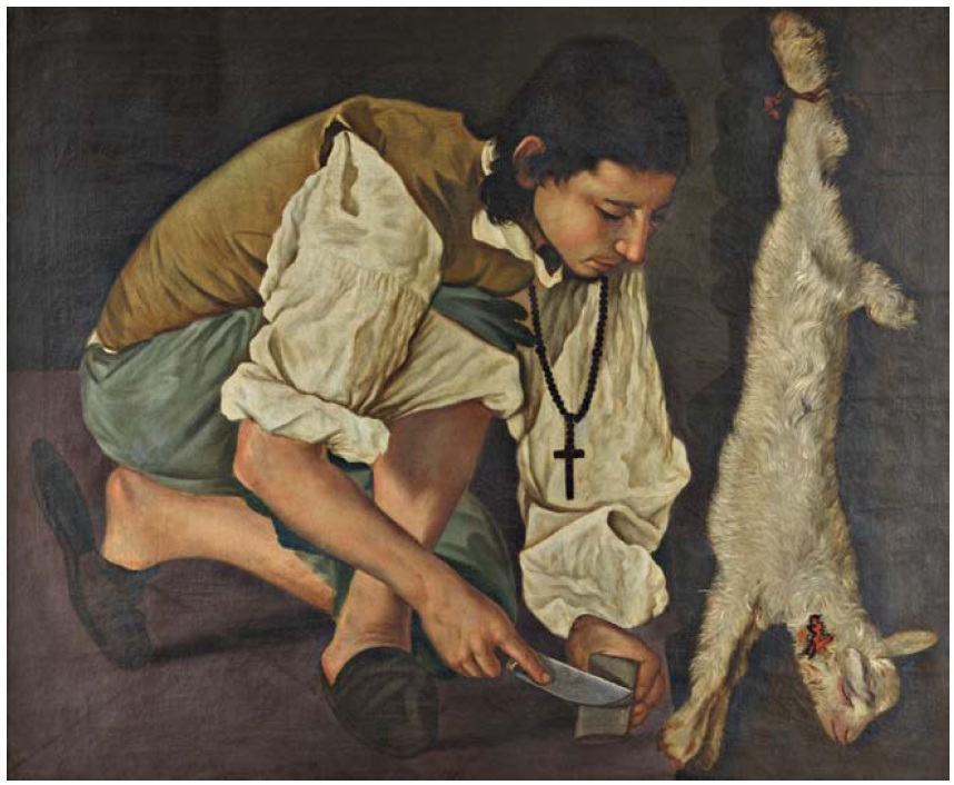 MORGADO DE SETÚBAL José António Benedito Soares de Faria e Barros (1752-1809) Rapaz matando um cordeiro Óleo sobre tela Dim. aprox.: 85 x 102,5 cm.